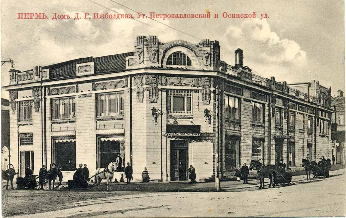 Торговый дом Сарапульского купца Ижболдина, Дмитрия Григорьевича в Перми